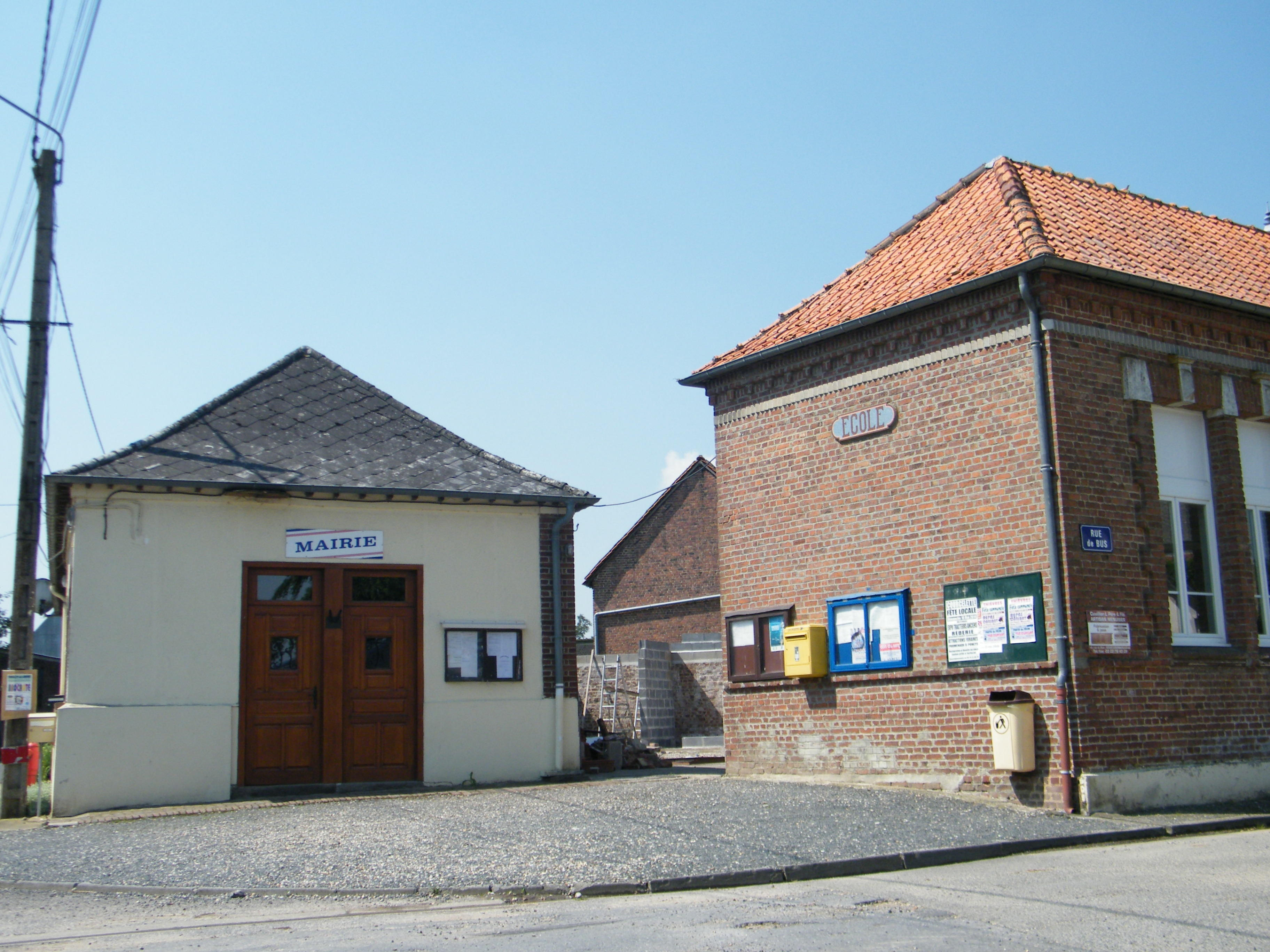 Mairie, image redressée.